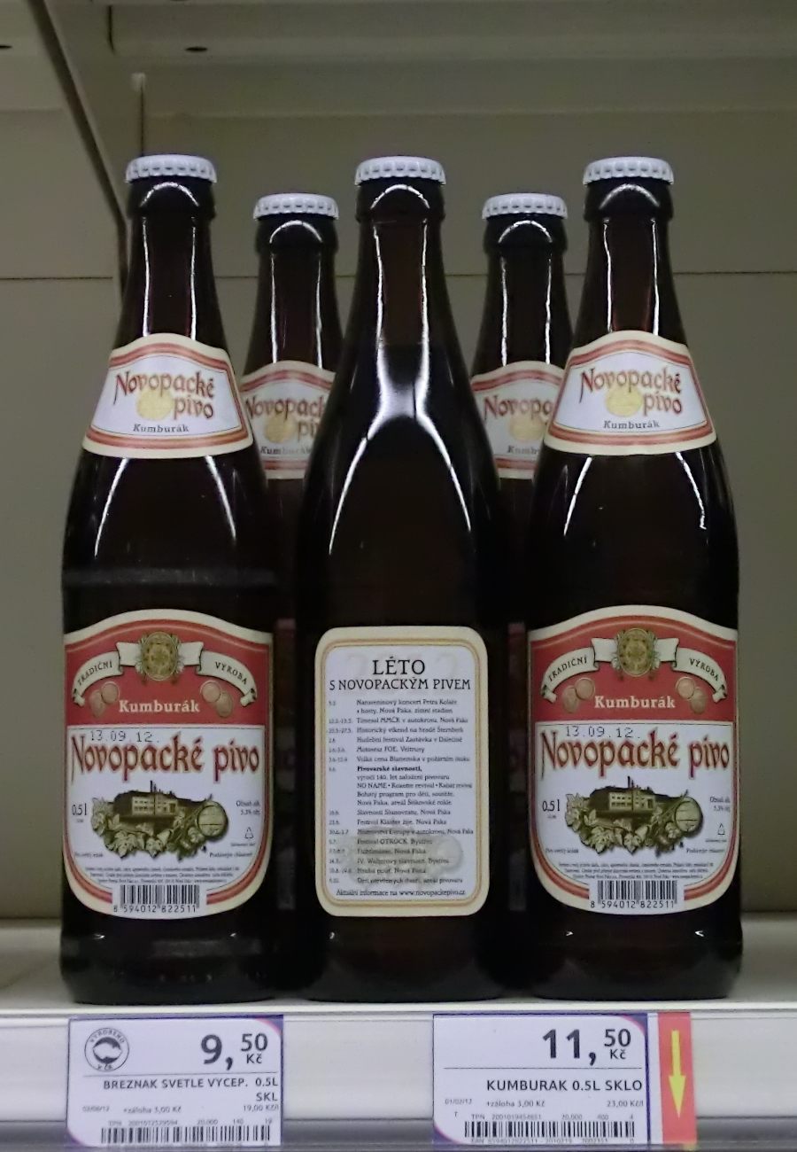 Láhve piva z Pivovaru Nová Paka a.s.: Kumburák, světlý ležák 12°